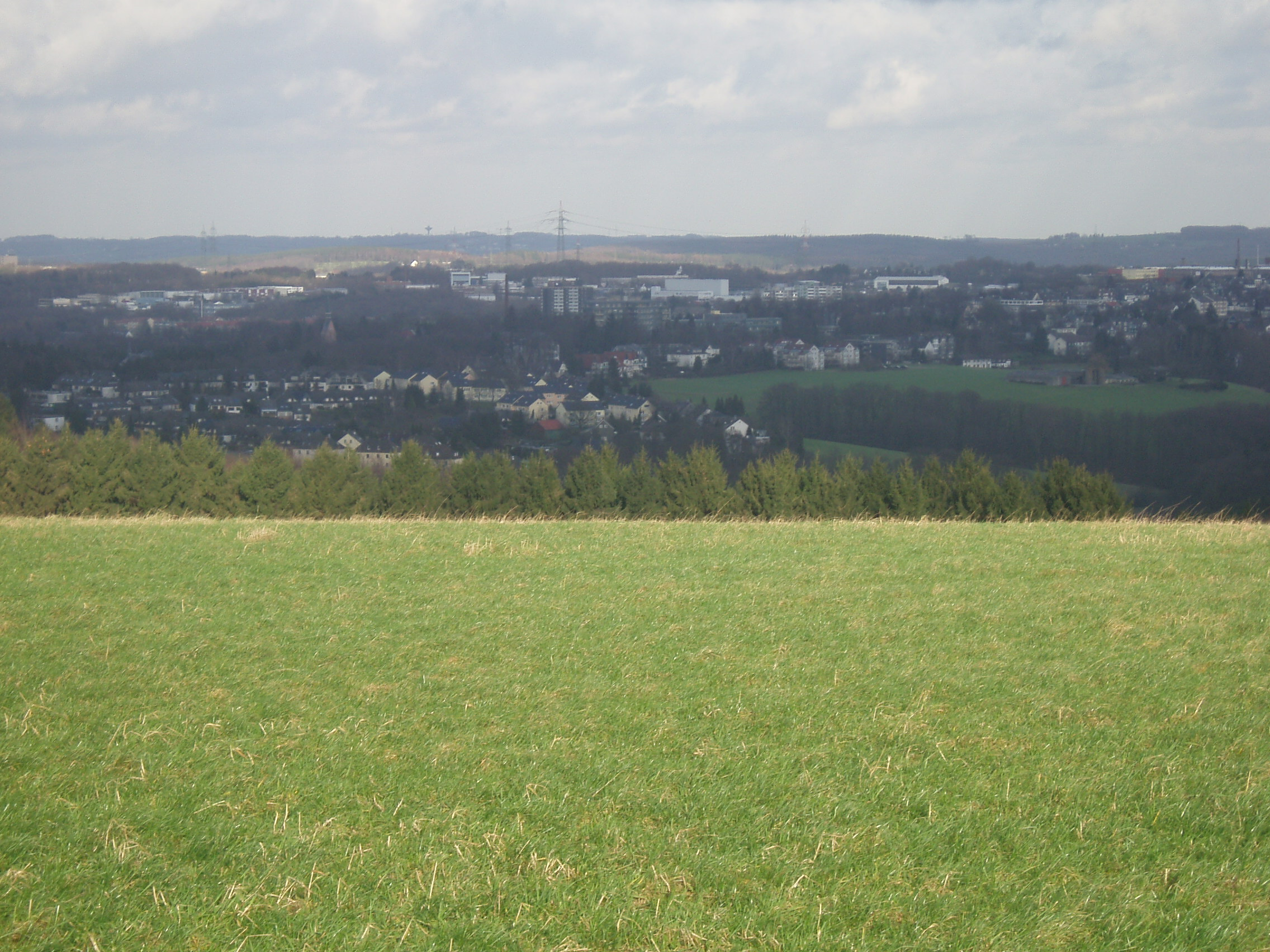 stellt einen Ausblick vom Hohenhagen (RS) dar